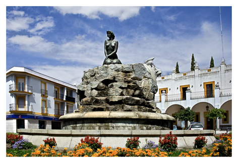 Fuente alegórica de la Villa